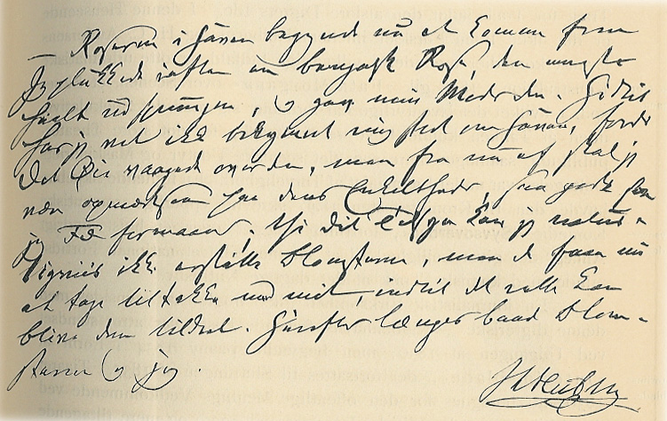 Johan Ludvig Heibergs håndskrift. Her i et brev fra juni 1834 til hans hustru som var rejst til Wien.